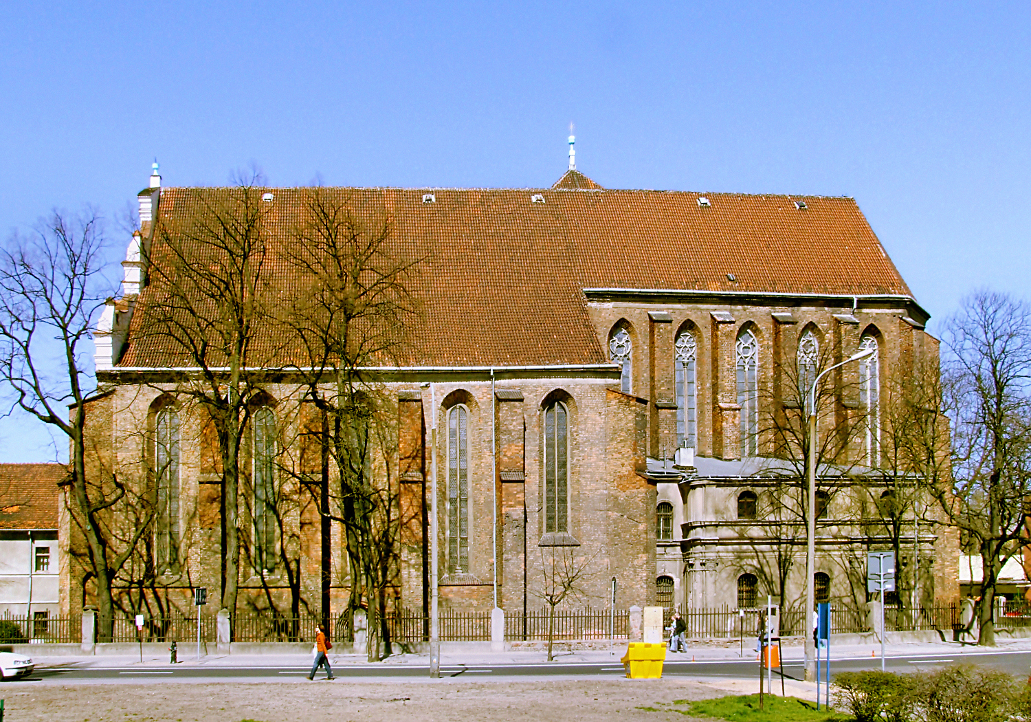 Poznań, kościół Bożego Ciała, widok od pd.(Poznań, Corpus Christi Church, view from south)